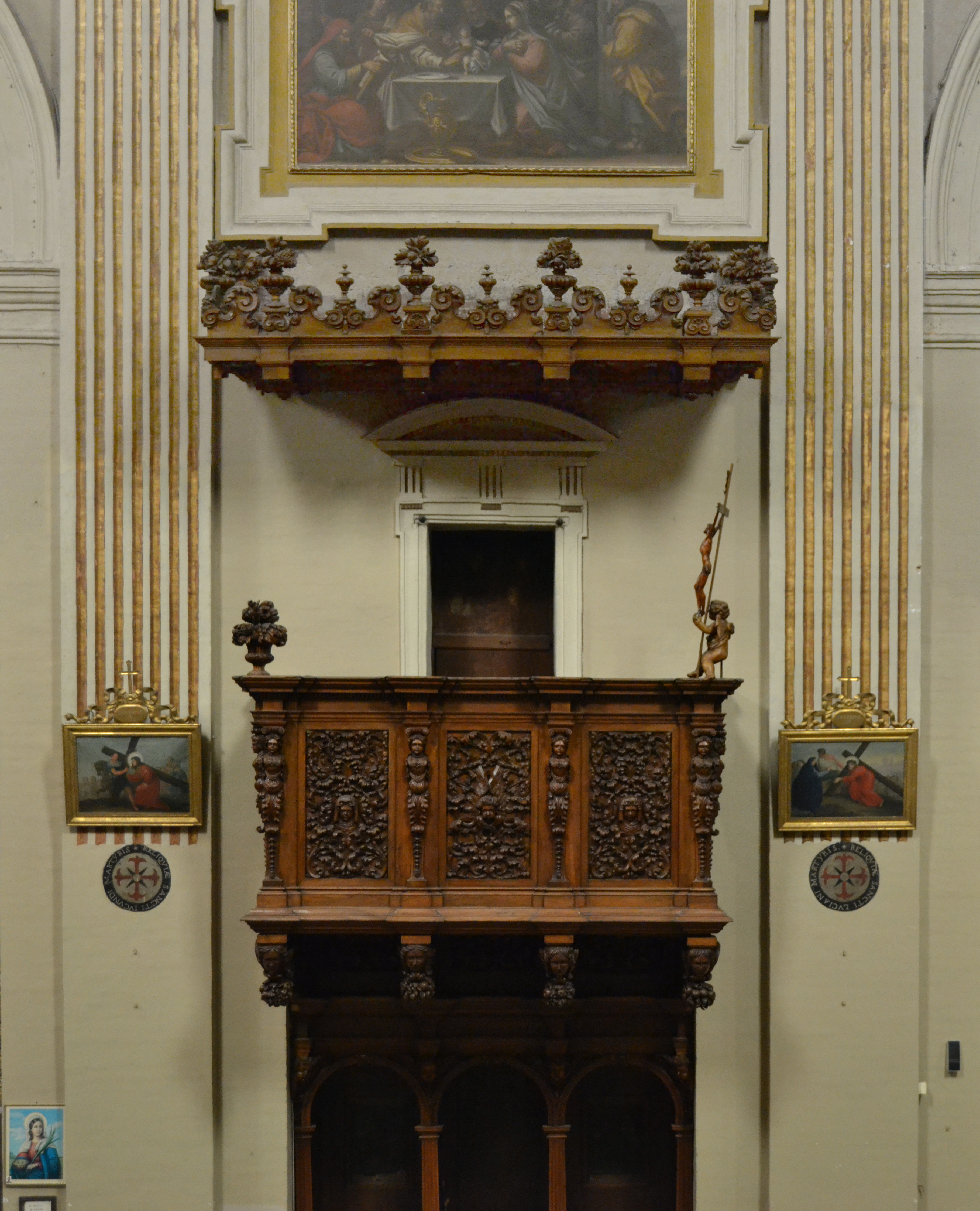 Photomerge di due foto del pulpito della chiesa dei Santi Giuseppe, Tecla e Rita